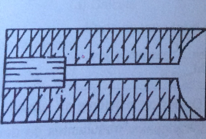 Cavidade esférica.